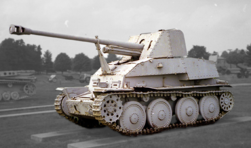 Panzerjäger 38(t) für 7.62cm PaK36(r) (Sd.Kfz.139), a.k.a. Marder III, Marder VII and Marder VIII. On display in the US Army Ordnance Museum at Aberdeen. The picture taken in year 2000.